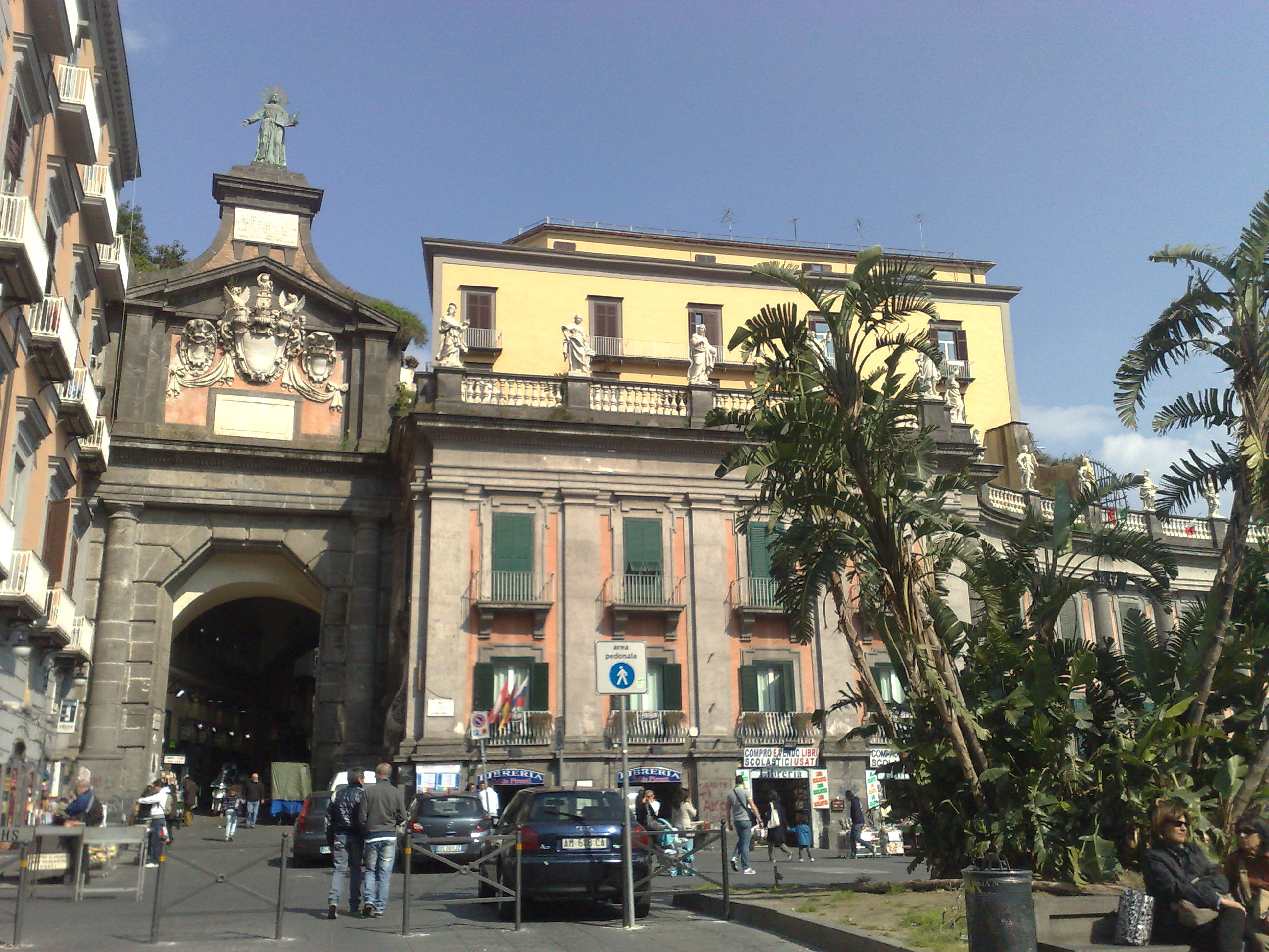 Port'Alba. Napoli.